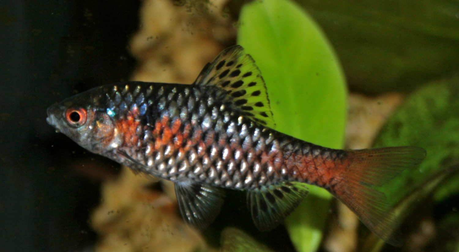 Puntius padamya (= "Puntius stoliczkanus var. Odessa")